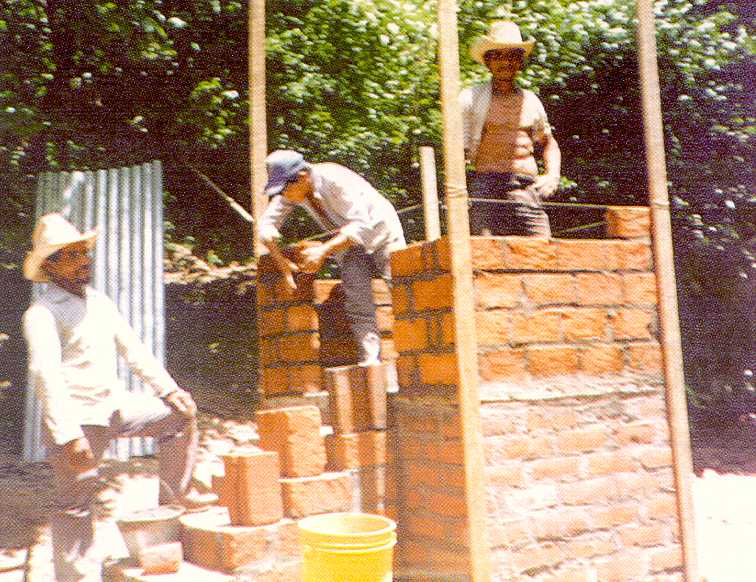 Letrina abonera en construcción con participación comunitaria. Regón Paracentral de El Salvador. Programa de Higiene Básica y Salud financiado por la Unión Europea. 1994 - 1998 Autor: Alfredo Bianco (Construction of latrine with community participation. El Salvador. European Union Health and Basic Hygiene Program.)